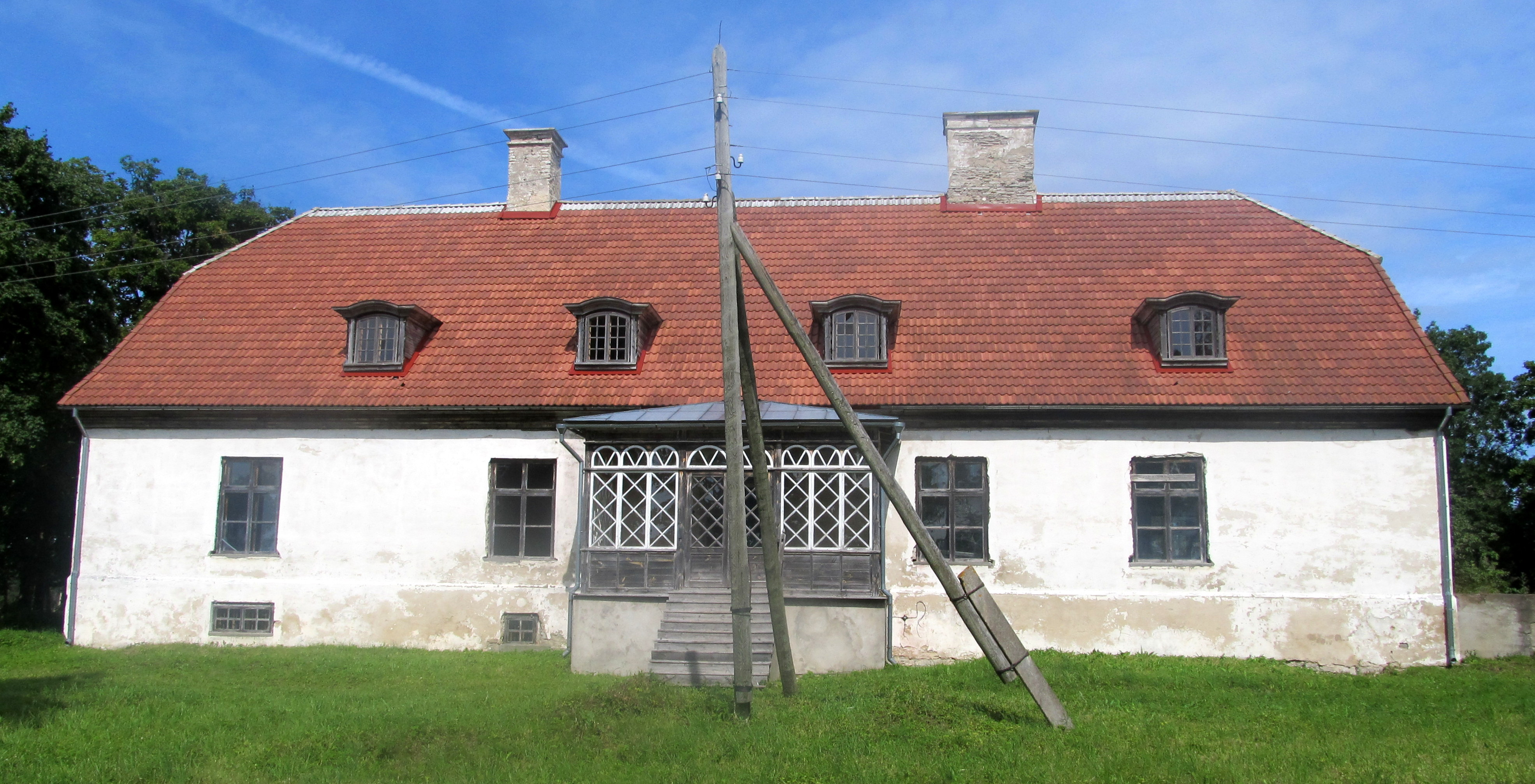 Reigi pastoraadi peahoone